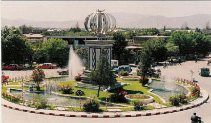 Salmas shardari